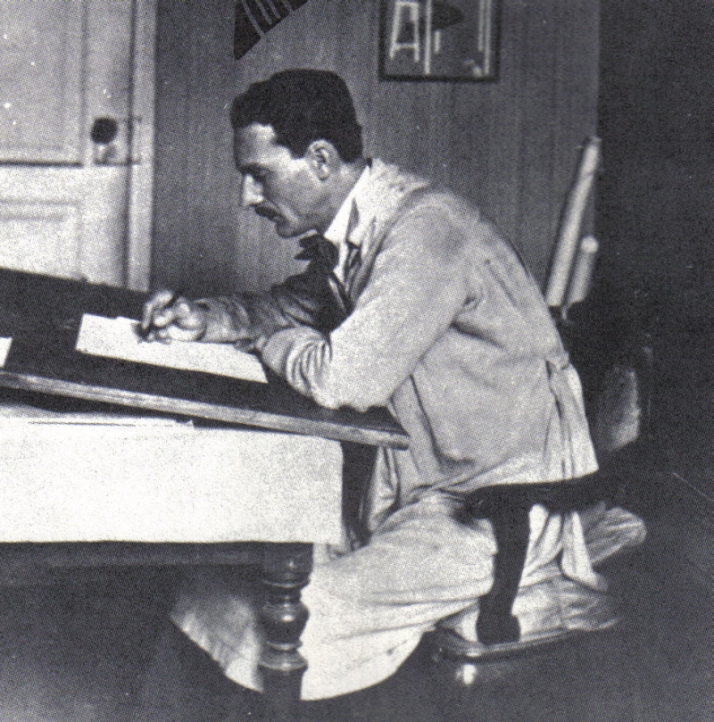 J.Carlos em seu estúdio, por volta de 1920